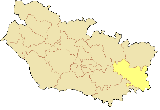 Canton de Ham dans le département de la Somme